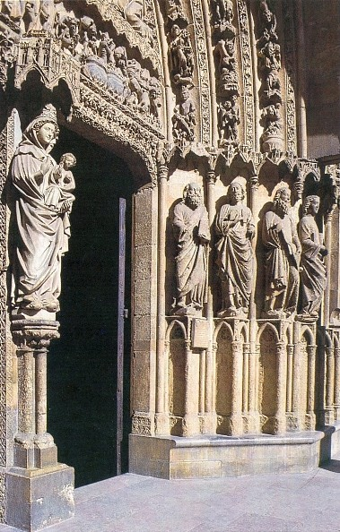 Portada de la Catedral de León.